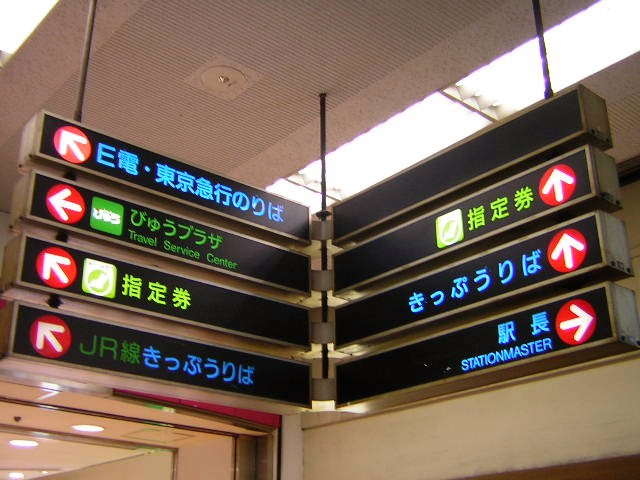 蒲田駅に存在した「E電」表記 都区内では最後まで残存した表記と思われる。2005年3月9日撮影。2006～2007年頃、駅改良工事にともない撤去された。